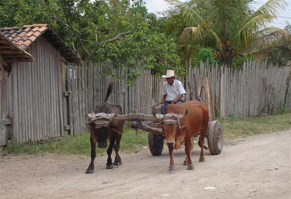 Road in Talanga, Francisco Morazán, Honduras